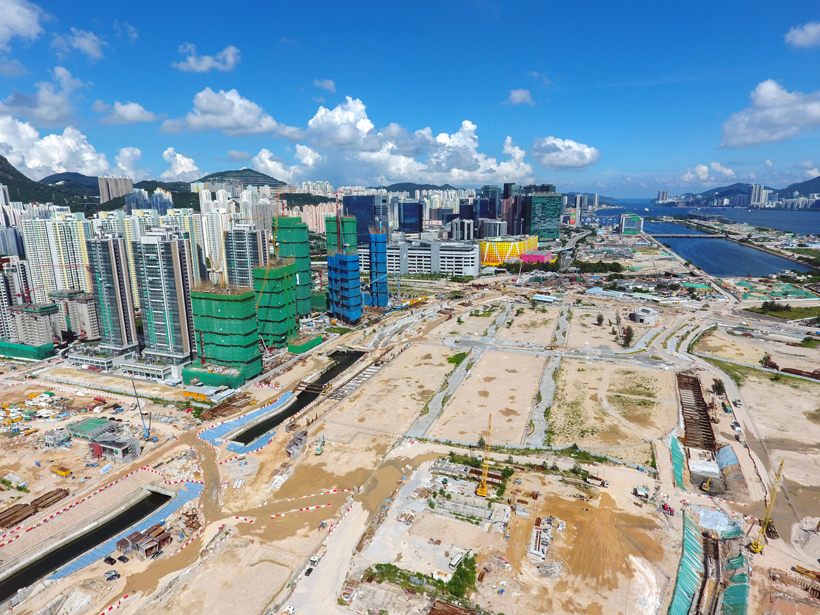 Kai Tak Grid Neighbourhood